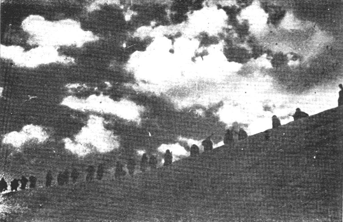 Srpskohrvatski / српскохрватски: Šesta proleterska divizija u pokretu preko Kupreškog polja, decembra 1943. godine.